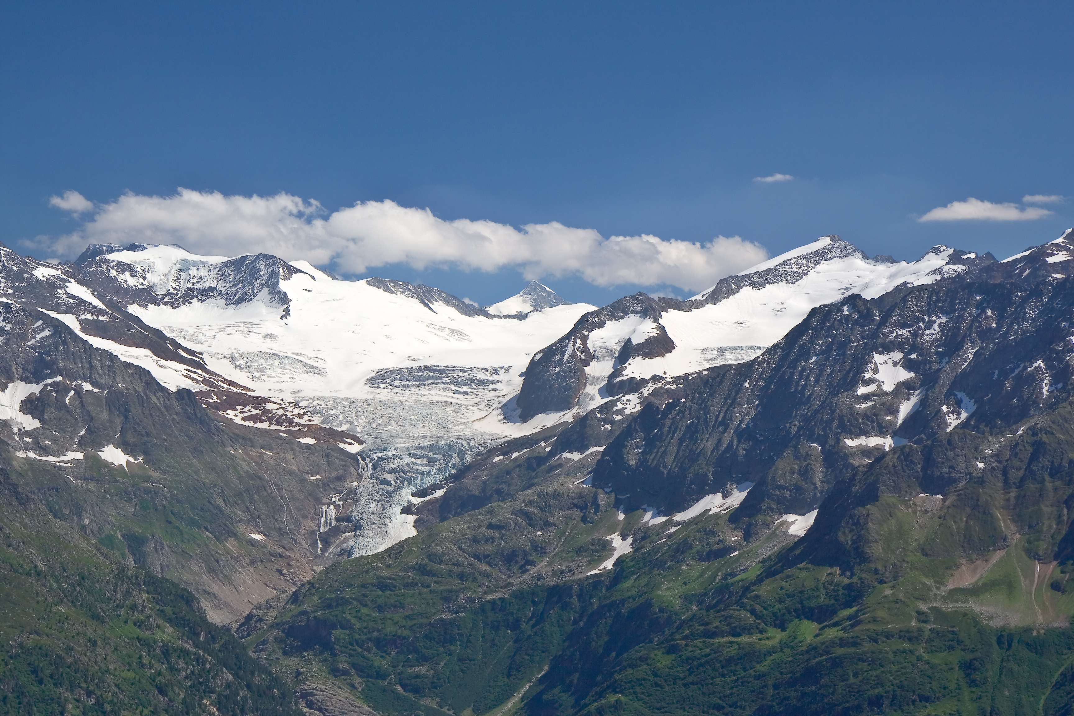 Der Triftgletscher beim Susten vom Balmeregghorn gesehen